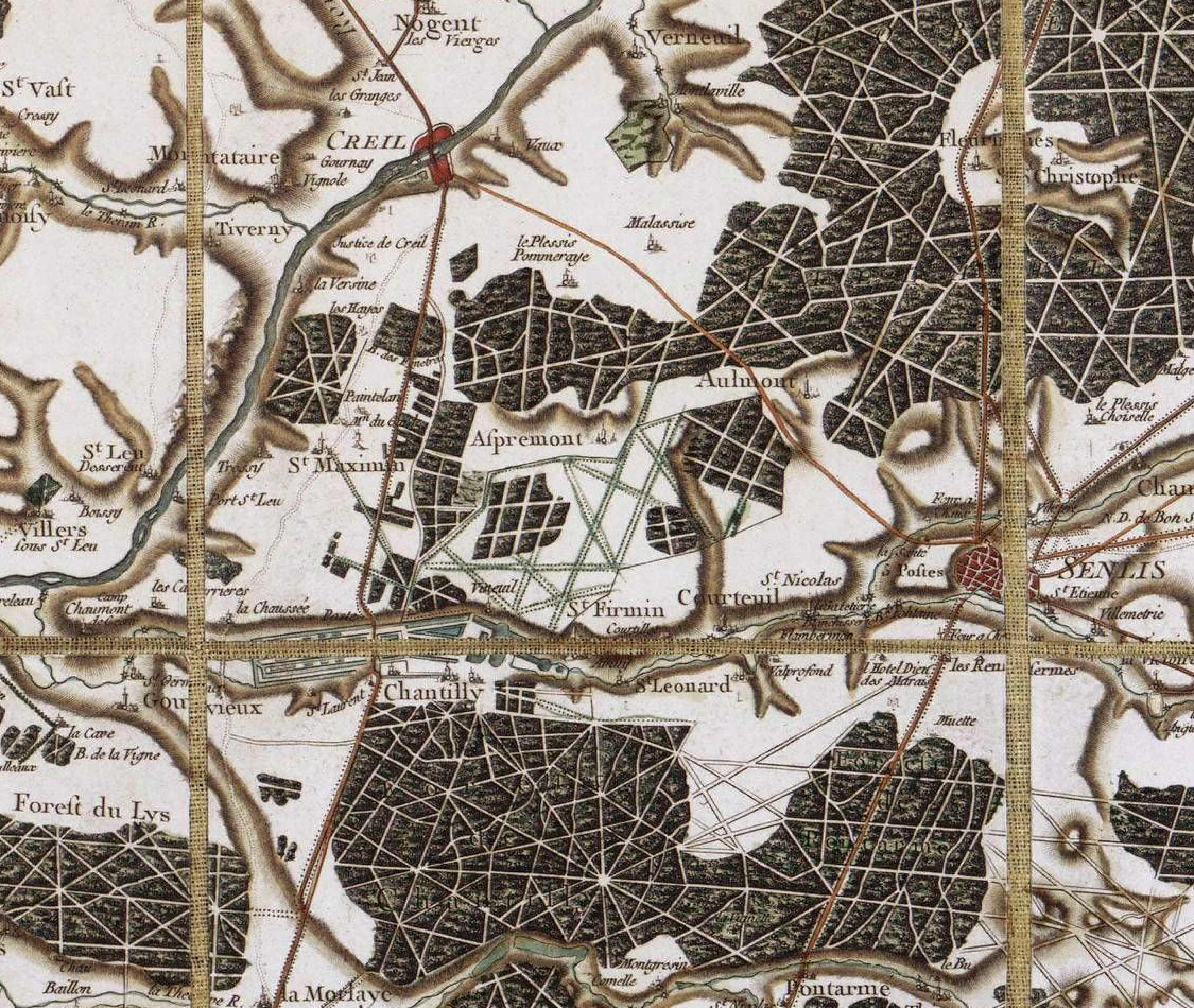 Carte Cassini n° 2 de Beauvais (Oise) : détail vers Creil, Senlis et Chantilly.